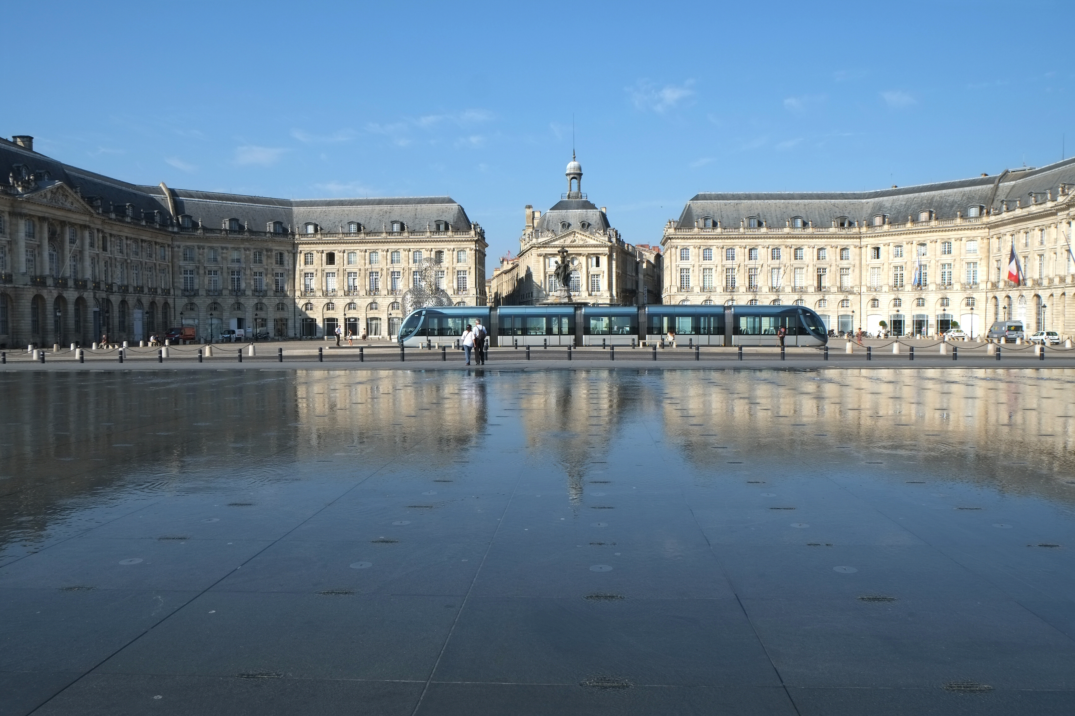 Place de la Bourse Bordeaux Gironde France